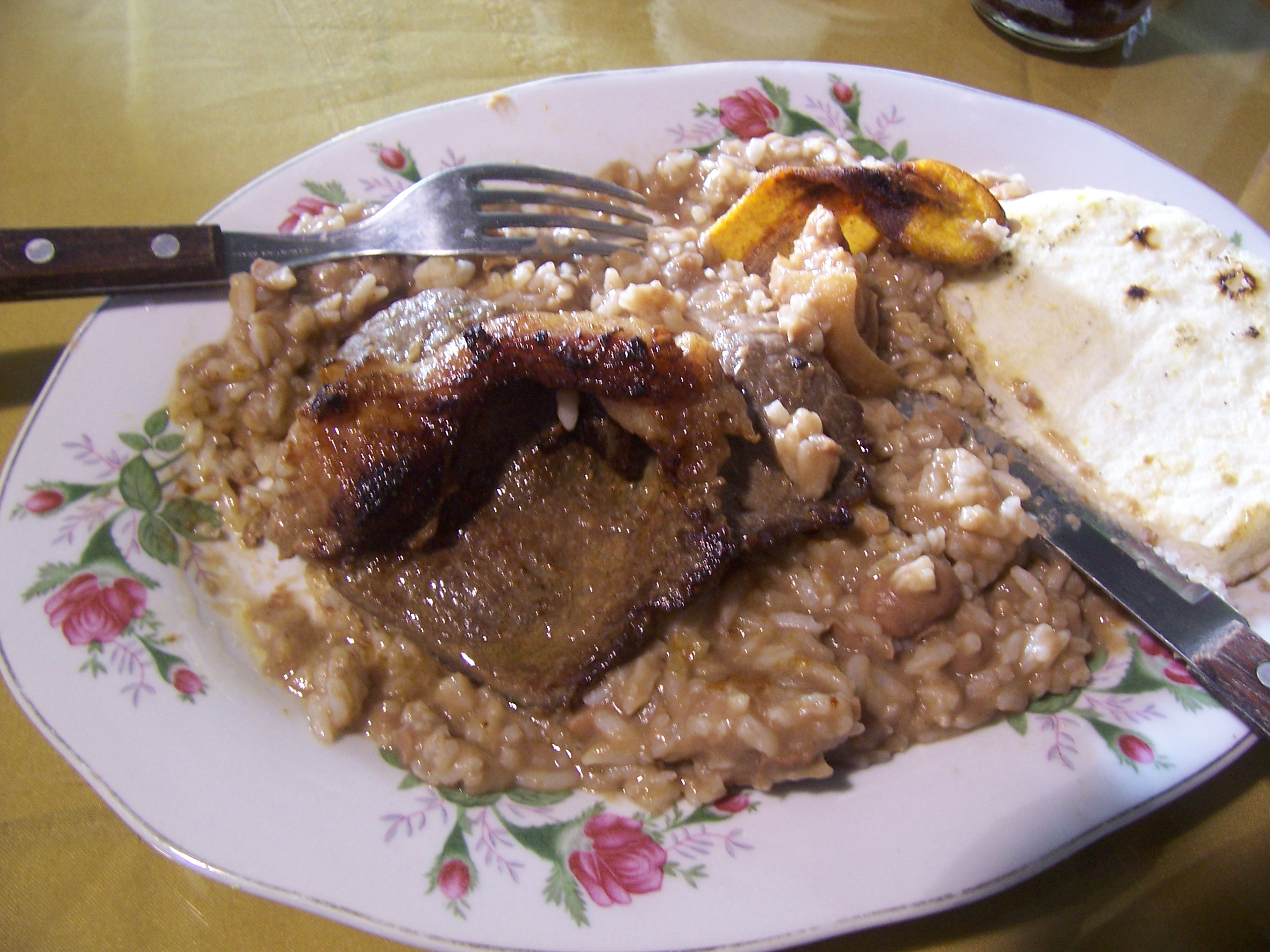 Calentao: Plato tipico de Colombia que normalmente está compuesto de alimentos sobrantes del día anterior (fríjoles, arroz, carne, plátano, etc)